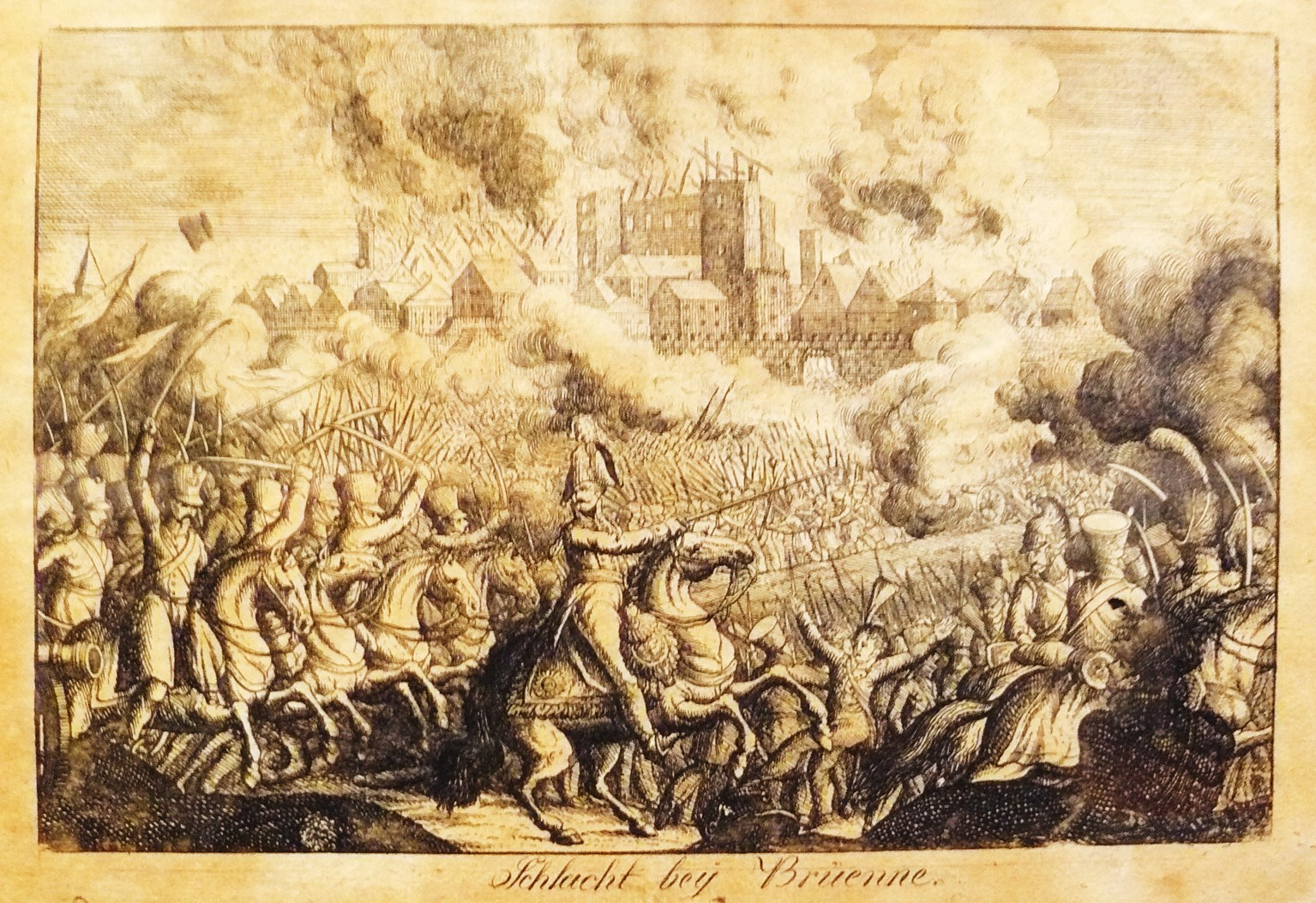 Bitwa pod Brienne-le-Château. Muzeum w Sierakowie. Litografia.